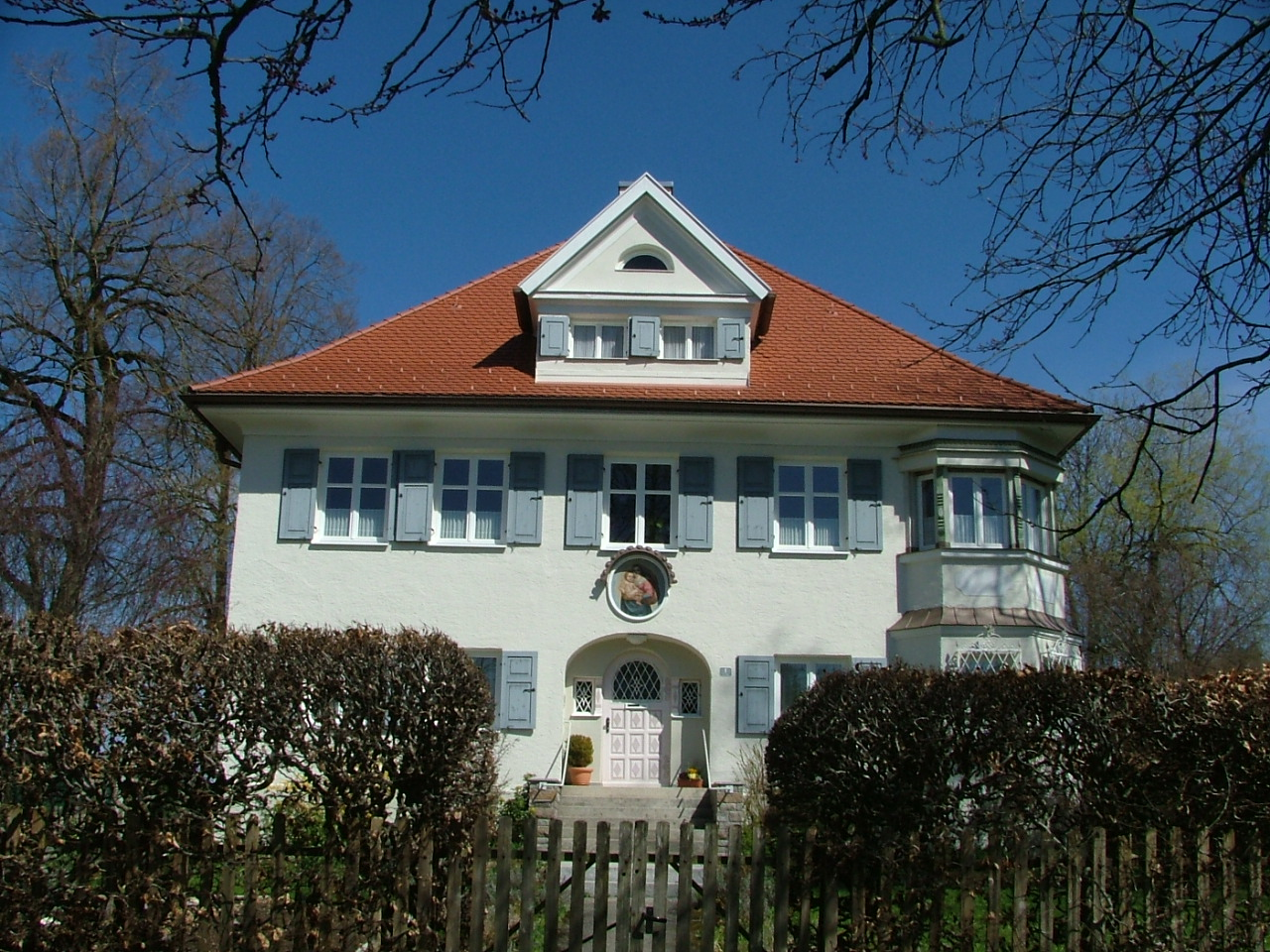 Pfarrhof